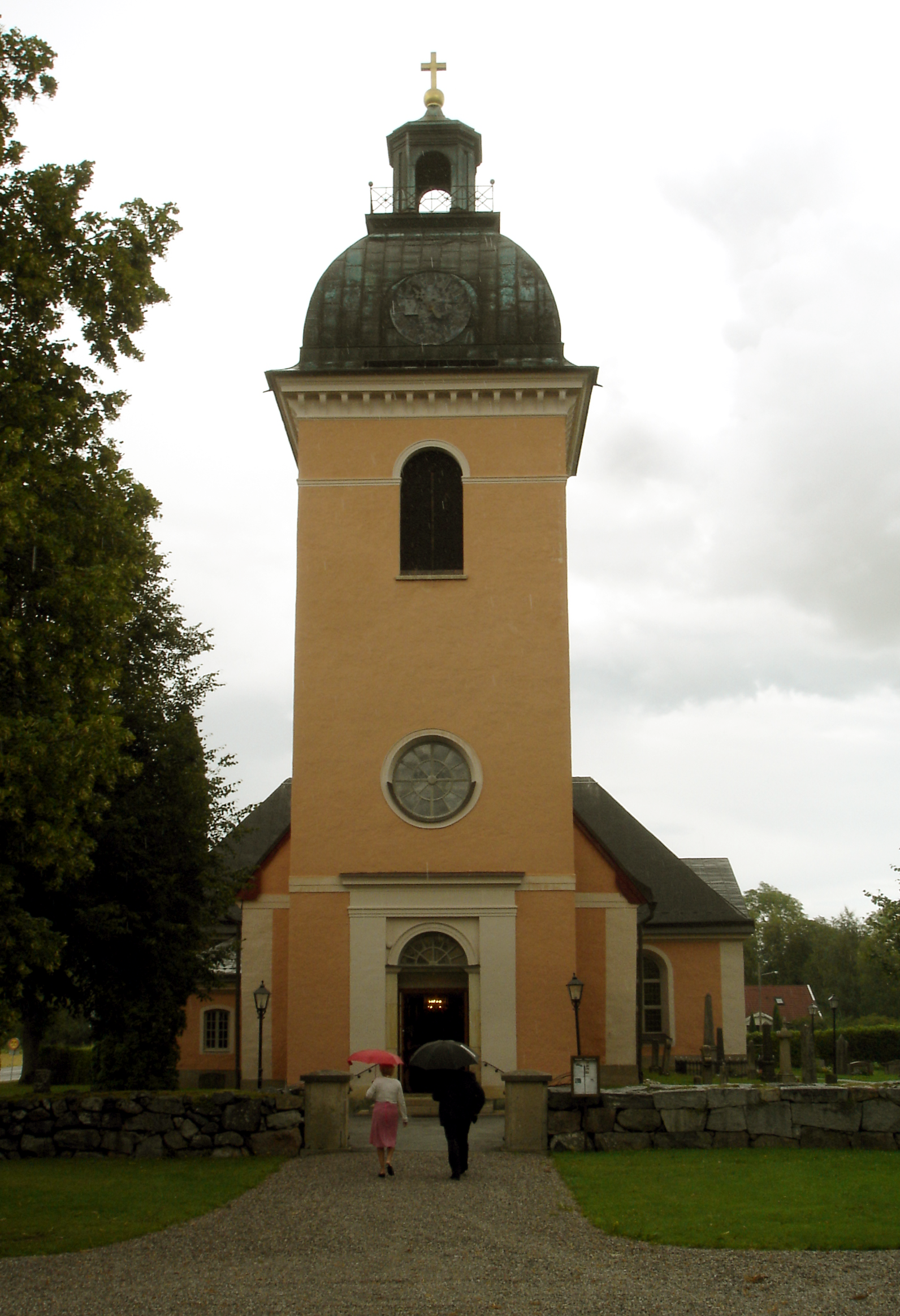 Rinkaby kyrka i Glanshammars församling, Strängnäs stift.